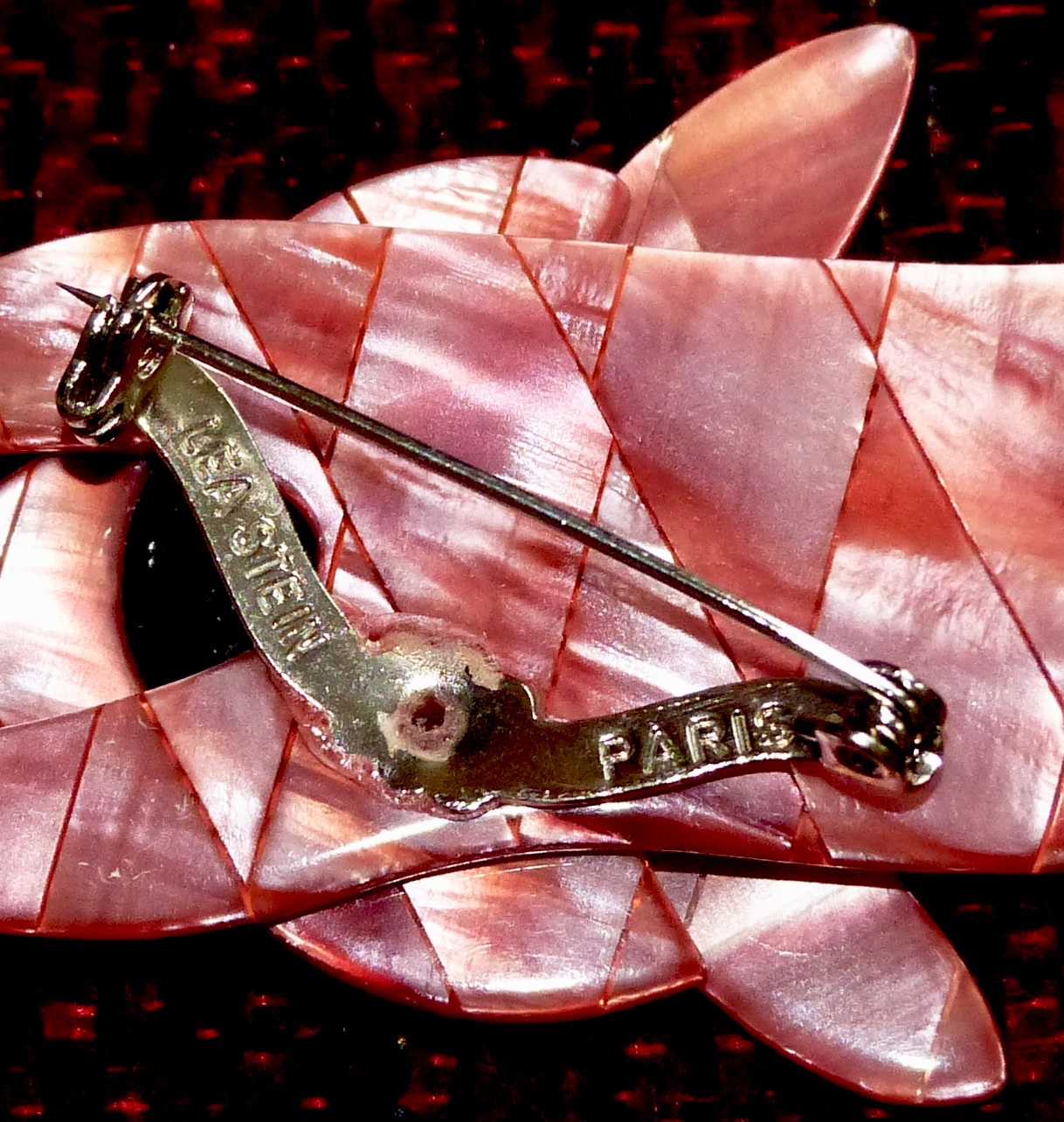 Laminiertes Celluloseacetat für die dreidimensionale Fuchs-Brosche von Léa Stein